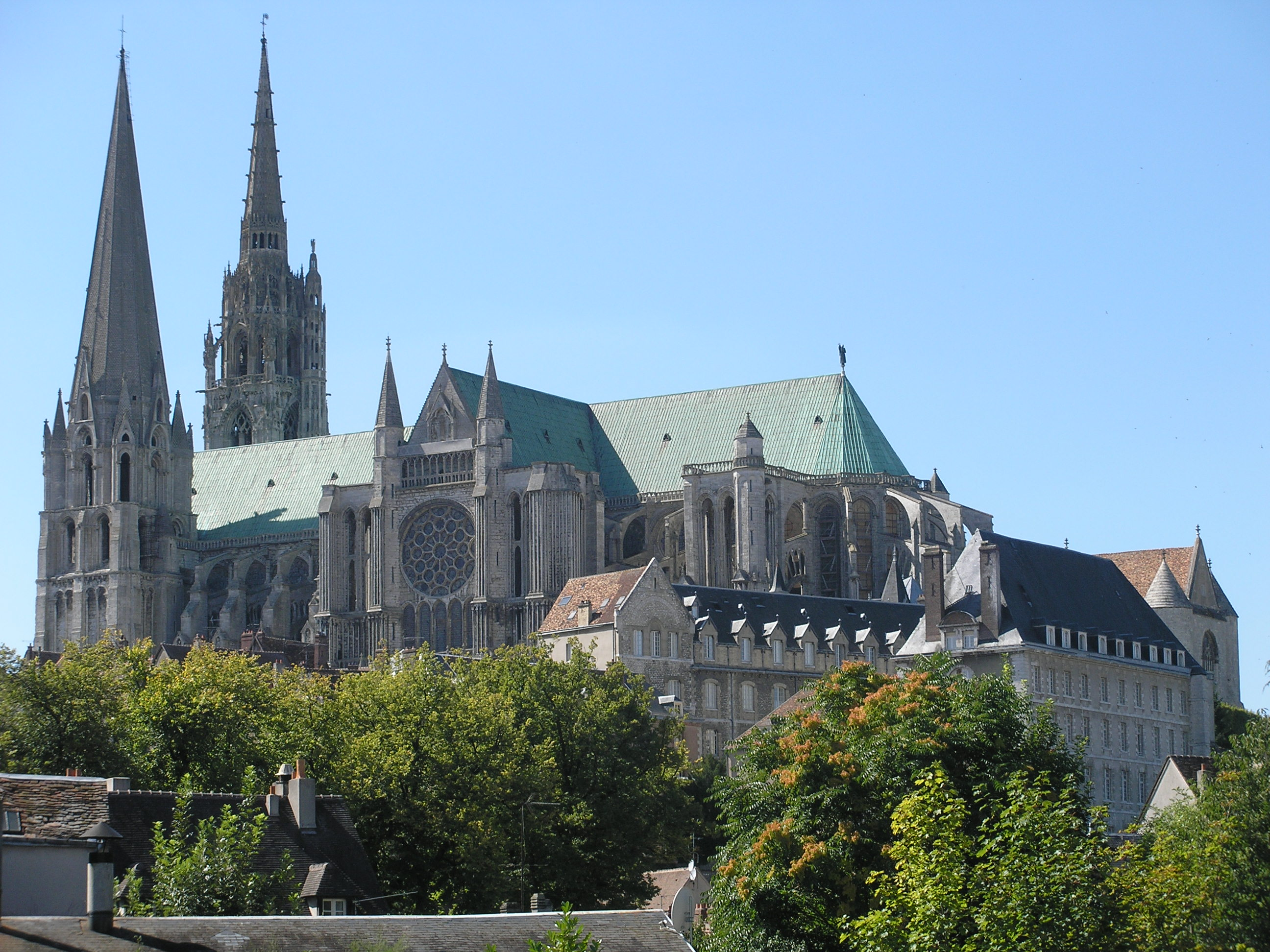 Cathédrale Notre-Dame de Chartres from the south, a masterpiece of Gothic architecture